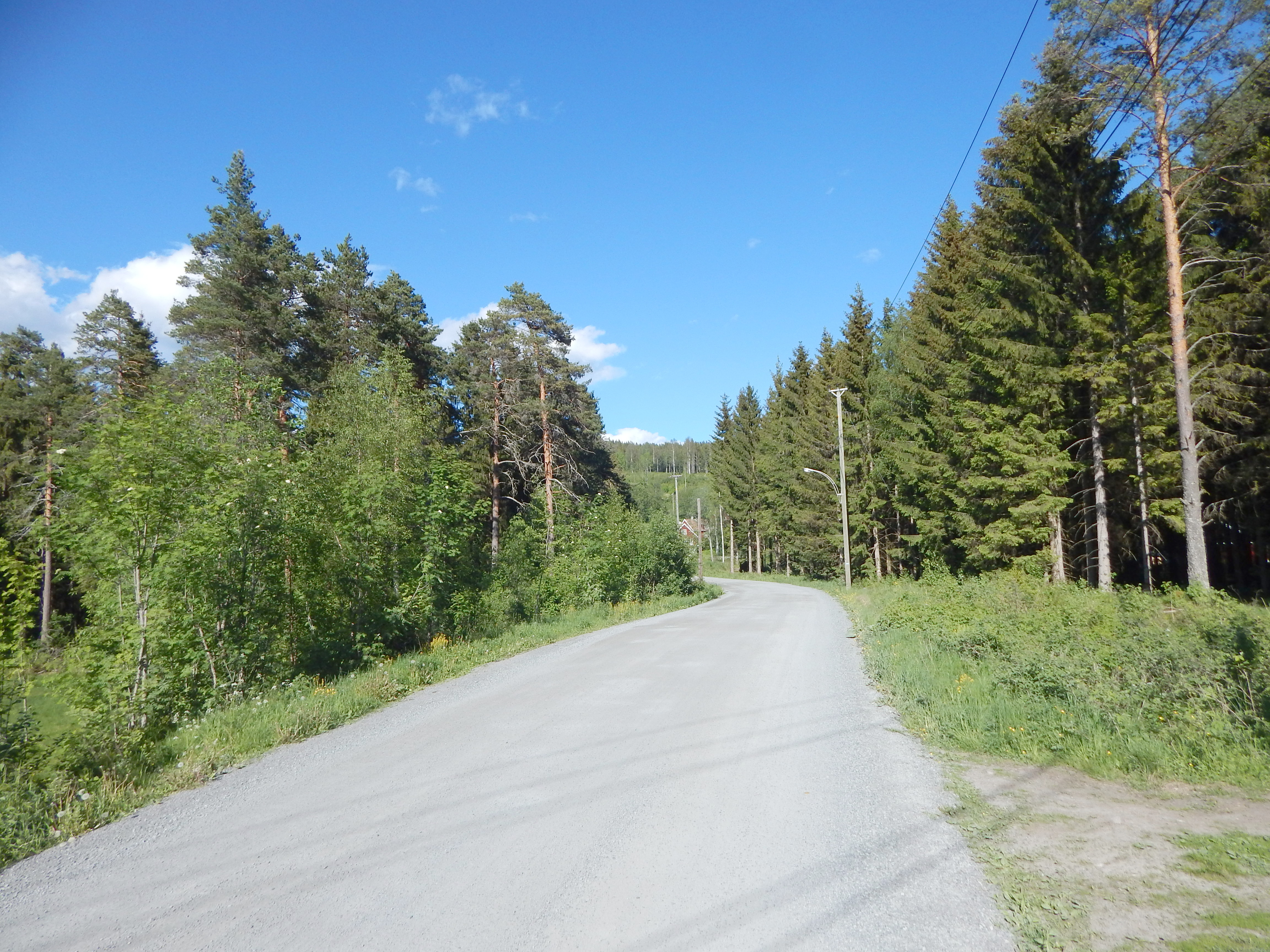 Sakariasveien